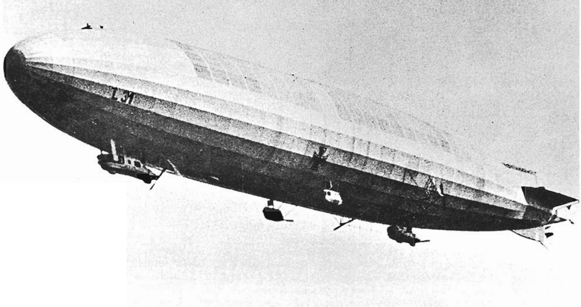 L 31 i luften